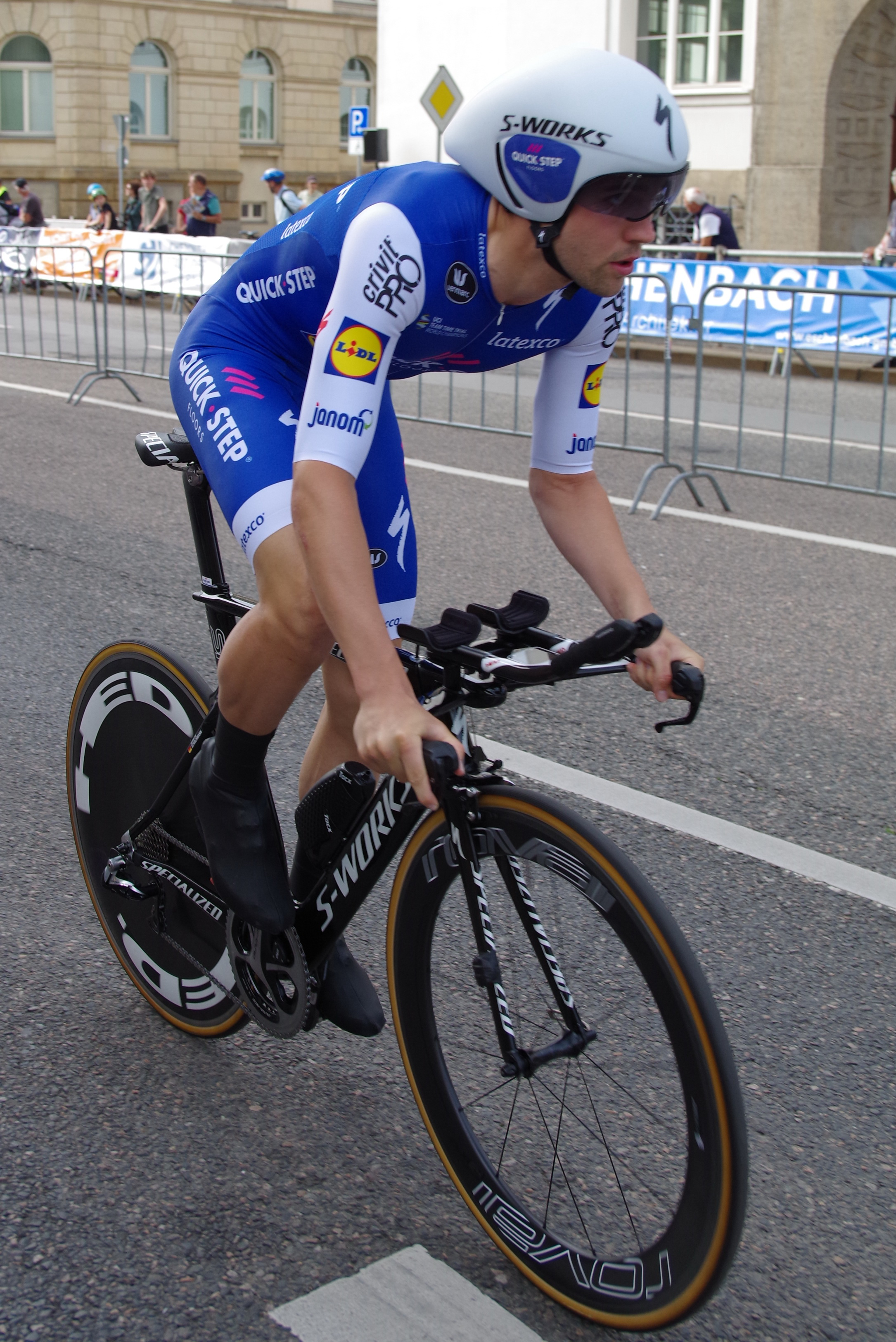 Deutsche Meisterschaften im Einzelzeitfahren 2017 23. Juni 2017 The making of this document was supported by the Community-Budget of Wikimedia Germany.